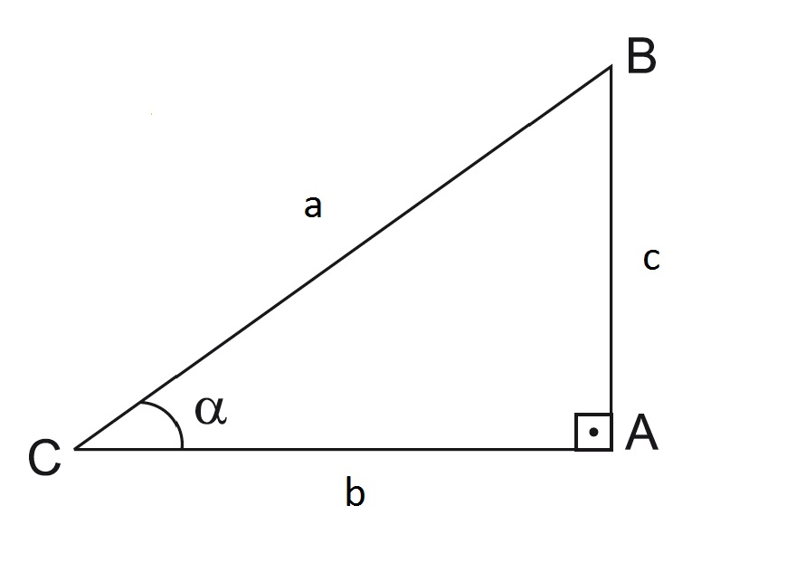 Um triângulo cujo um dos ângulos é reto